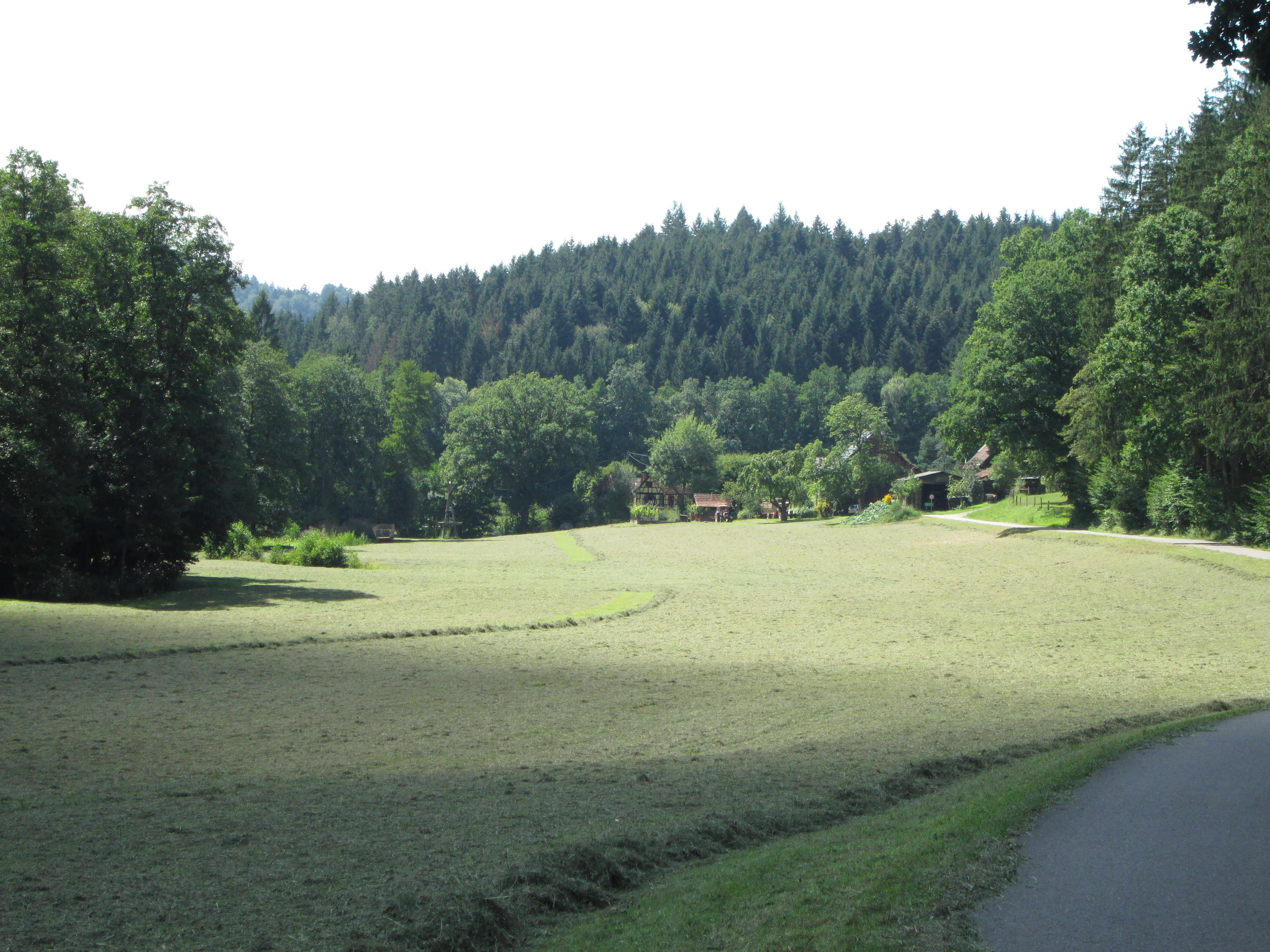 Schweizerbach (Rems), Blick talabwärts auf Maierhofer Sägmühle